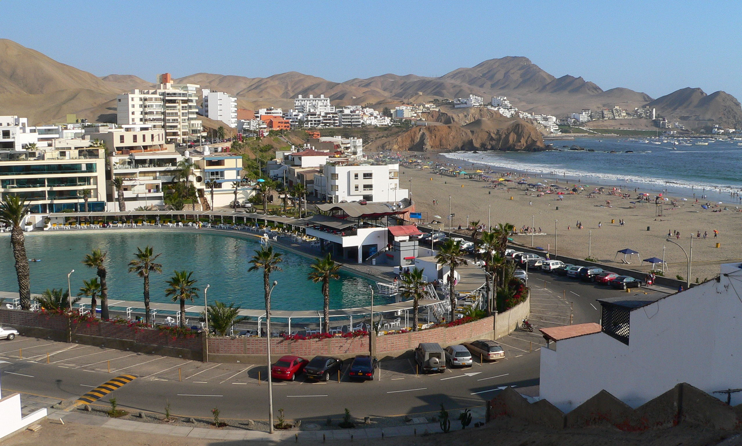 Balneario de Santa María del Mar, Distrito de Santa María del Mar, al sur de Lima